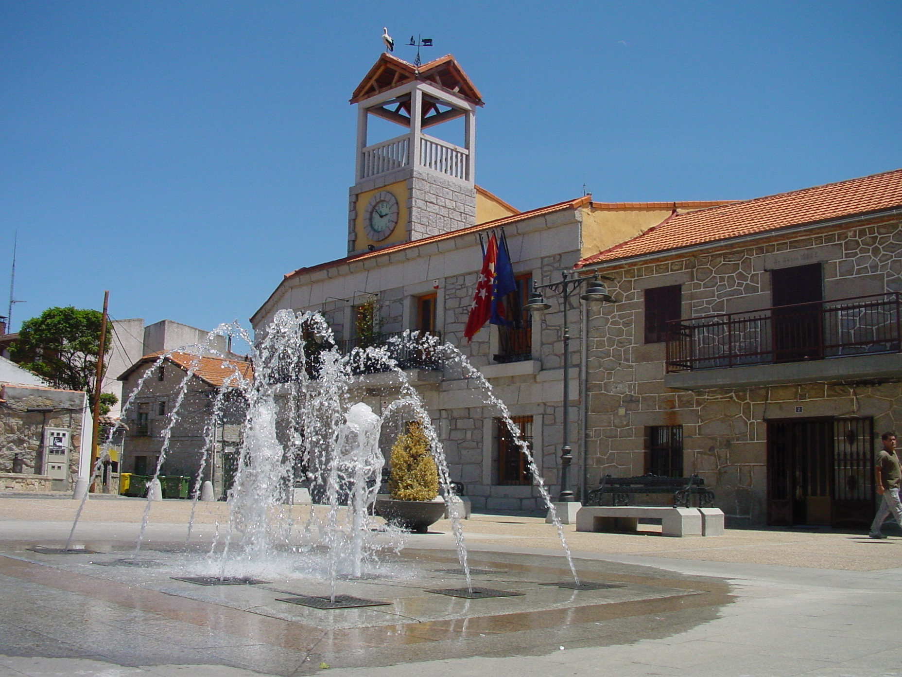 Ayuntamiento y fuente en Moralzarzal.